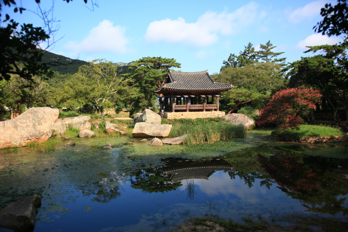 아침 일찍 보길도에서 촬영한 보길도윤선도원림의 세연정 전경